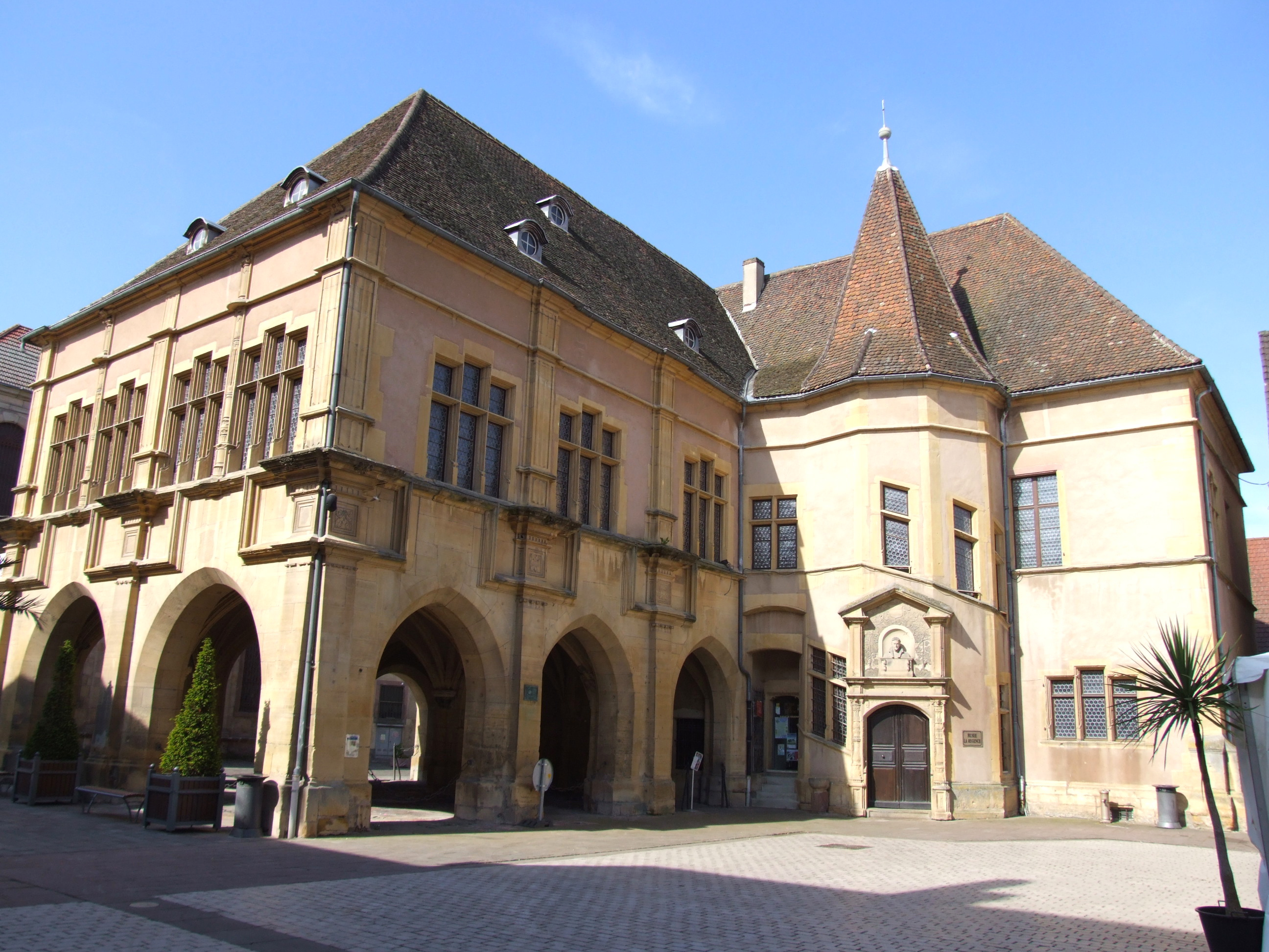 Datant du XVIe siècle, le Palais de la Régence fut le siège administratif des possessions rhénanes des Habsbourg.